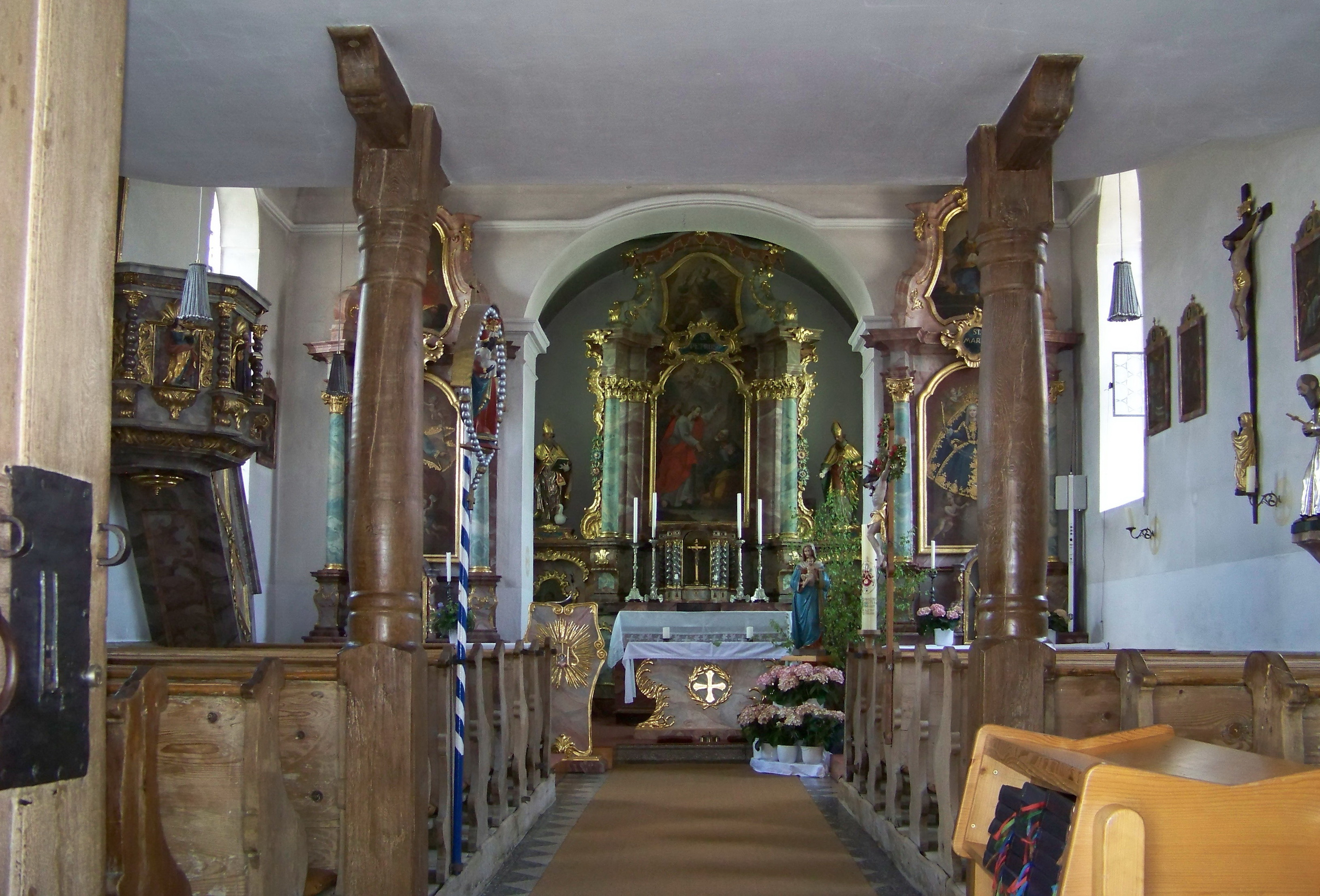 Landshut, Münchnerau, Kath. Kirche St. Petrus; spätromanischer Chorturmbau, 12./13. Jh. Innenraum. Das Langhaus ist flach gedeckt, der quadratische Chor hat ein Tonnengewölbe. Runder Chorbogen mit barocken Pilastern. Die geschweifte Empore wird von zwei runden Säulen getragen. Hochaltar Rokoko mit zwei schräggestellten Säulen aus der Mitte des 18. Jahrhunderts. Seitliches Rankwerk mit geschnitzten Blumen. Am Antependium Gemälde der Taufe Christi. An den seitlichen Durchgängen Gemälde St. Wendelin und Notburga. Hauptbild: Schlüsselübergabe an Petrus. Im Auszug Gottvater. Seitenfiguren: St. Martin und St. Nikolaus.